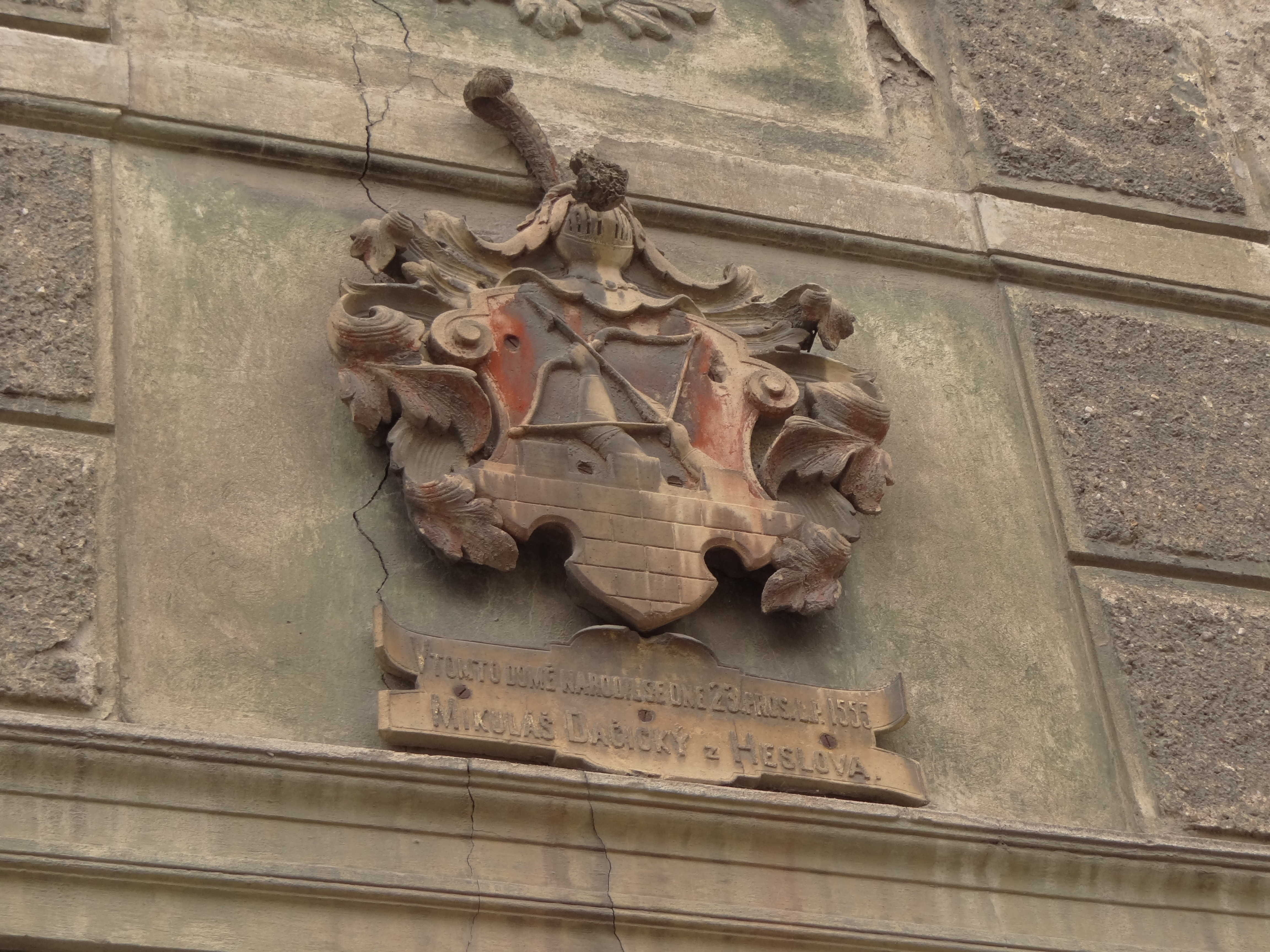 Kutná Hora - erb na rodném domě Mikuláše Dačického z Heslova